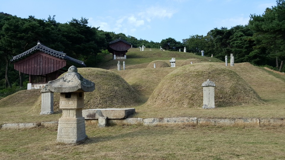 경기도 군포시 속달동에 있는 정난종선생 묘역이다.